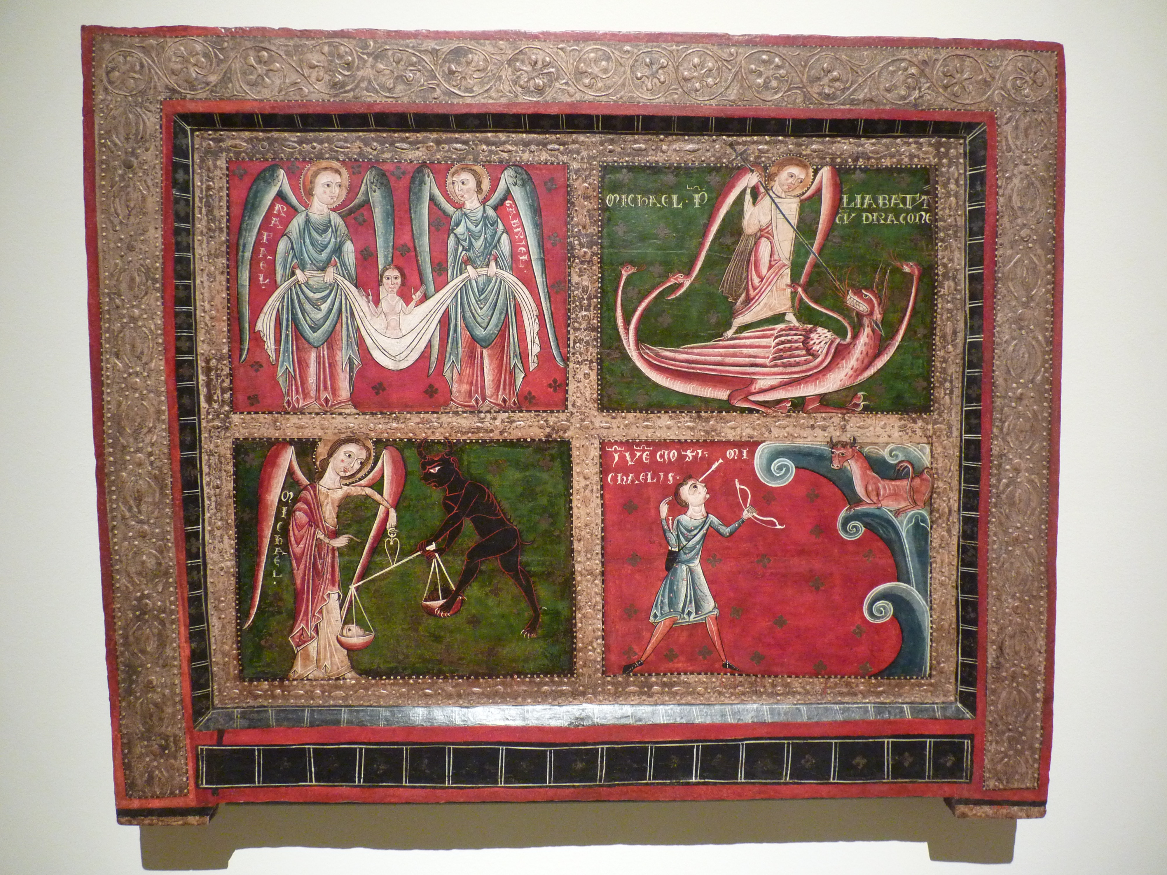 Frontal d'altar dels Arcàngels. MESTRE DE SANT PAU DE CASSERRES. Segon quart del segle XIII